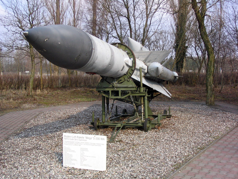 Beschreibung: russische Boden-Luft-Rakete Wega S-200 WA Nato Code: SA 5 Gammon ausgestellt im Historisch-technischen Informationszentrum Peenemünde Author/Fotograf: Darkone, 28. Februar 2004